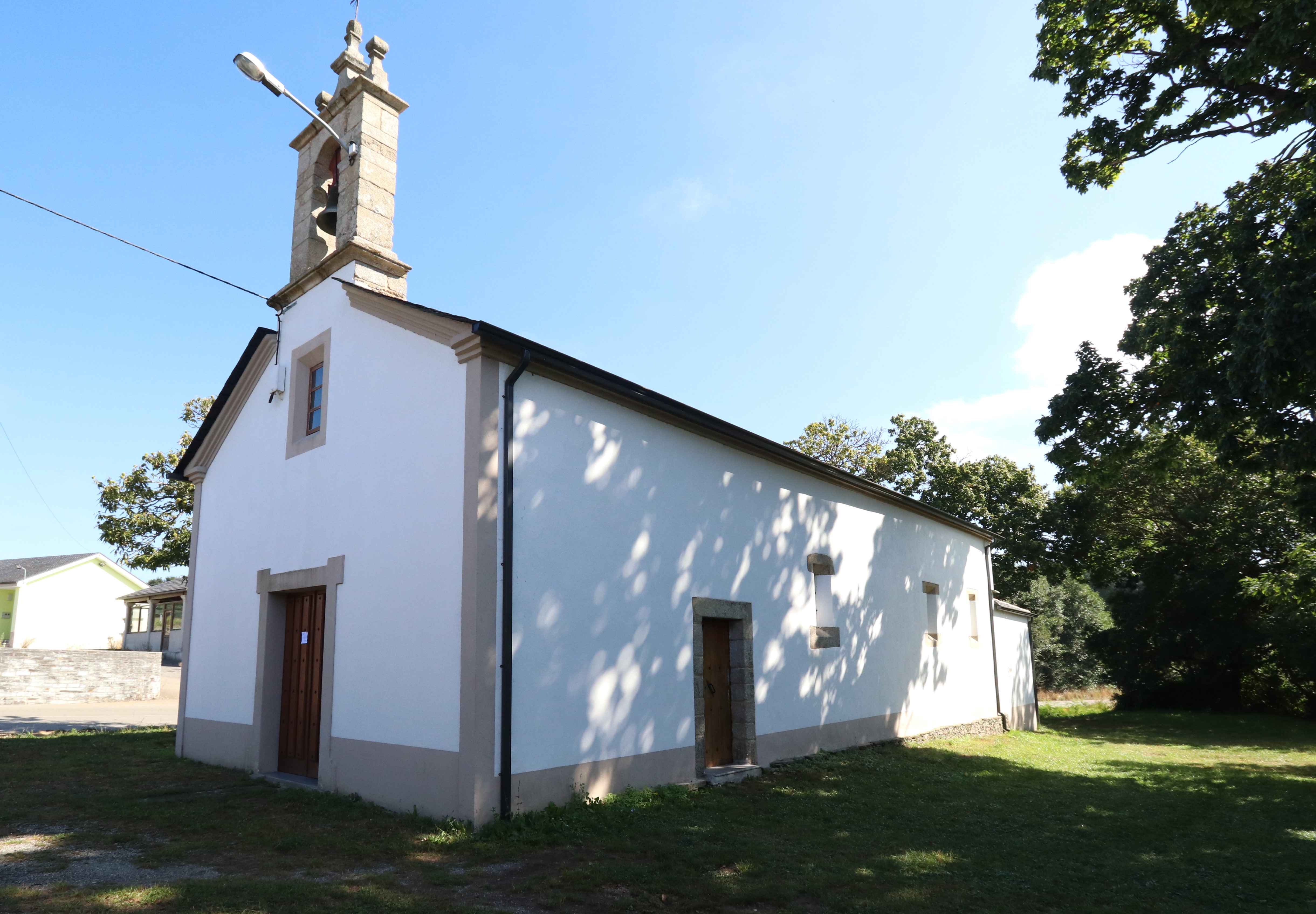 Igrexa da Graña de Vilarente, Abadín.